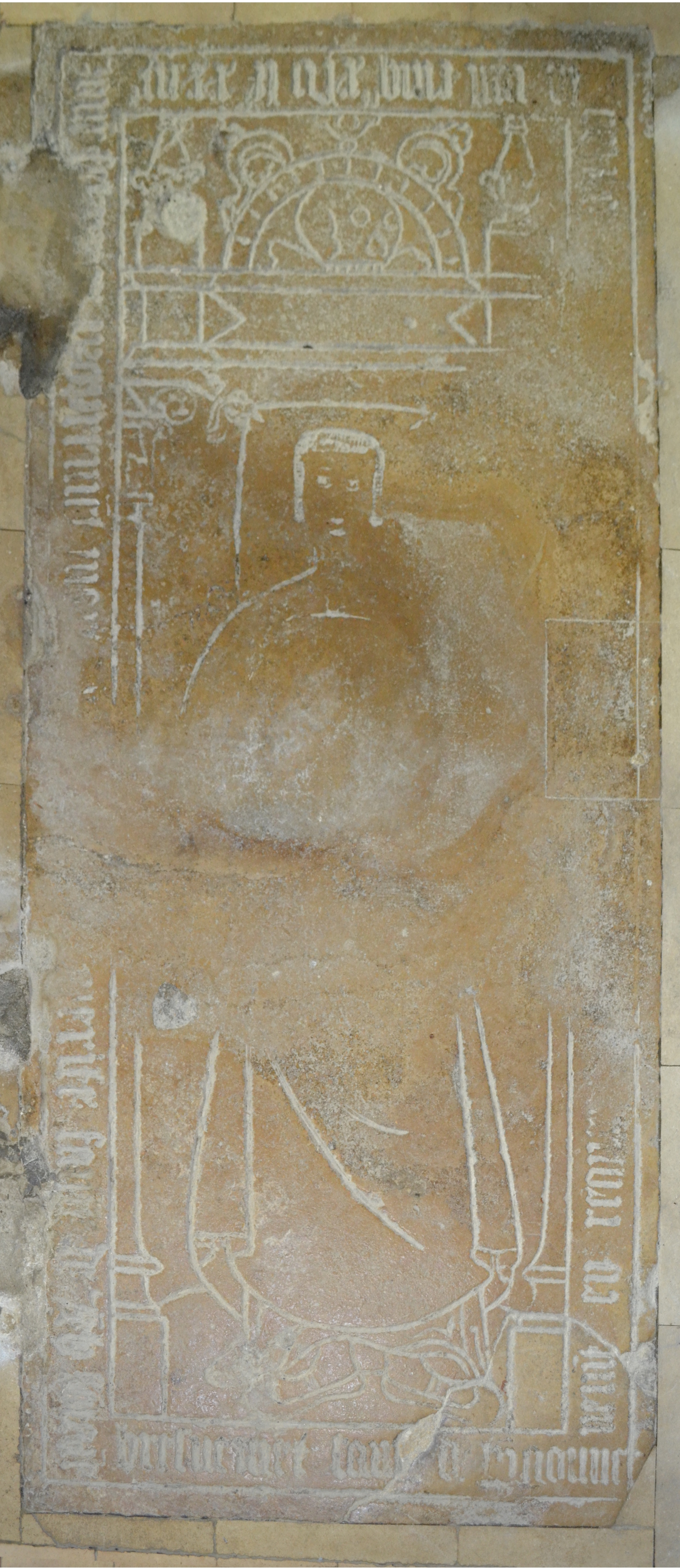 Dalle funéraire médiévale située dans la nef de l'église de Neuilly-le-Malherbe (Calvados). 166 x 72 cm. L'inscription (Merci à C. Maneuvrier) se lit depuis l'extérieur ː LA(n) MIL CINQ cc XLV LE XXIIe / JOUR DE FEB(vrier) [...] ERITE FAME DE JEH(an) [...] / [...] "Ici git ... (nom de la femme) et à la fin : "qui trepassa l'an mil...." et à la toute fin , un appel à la prière pour les passants.